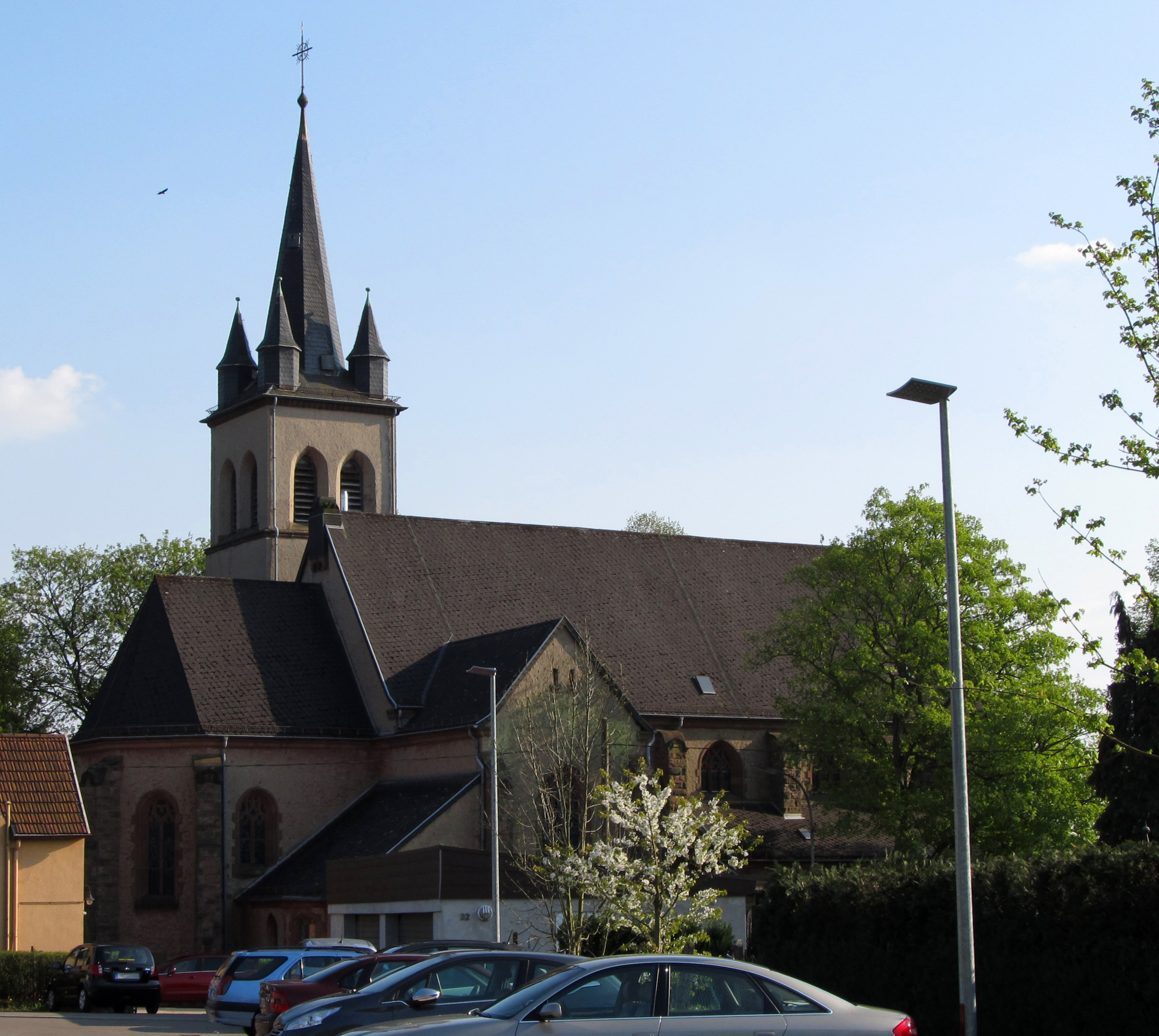 Die katholische Pfarrkirche St. Barbara in Stennweiler, einem Ortsteil der Gemeinde Schiffweiler, Landkreis Neunkirchen, Saarland